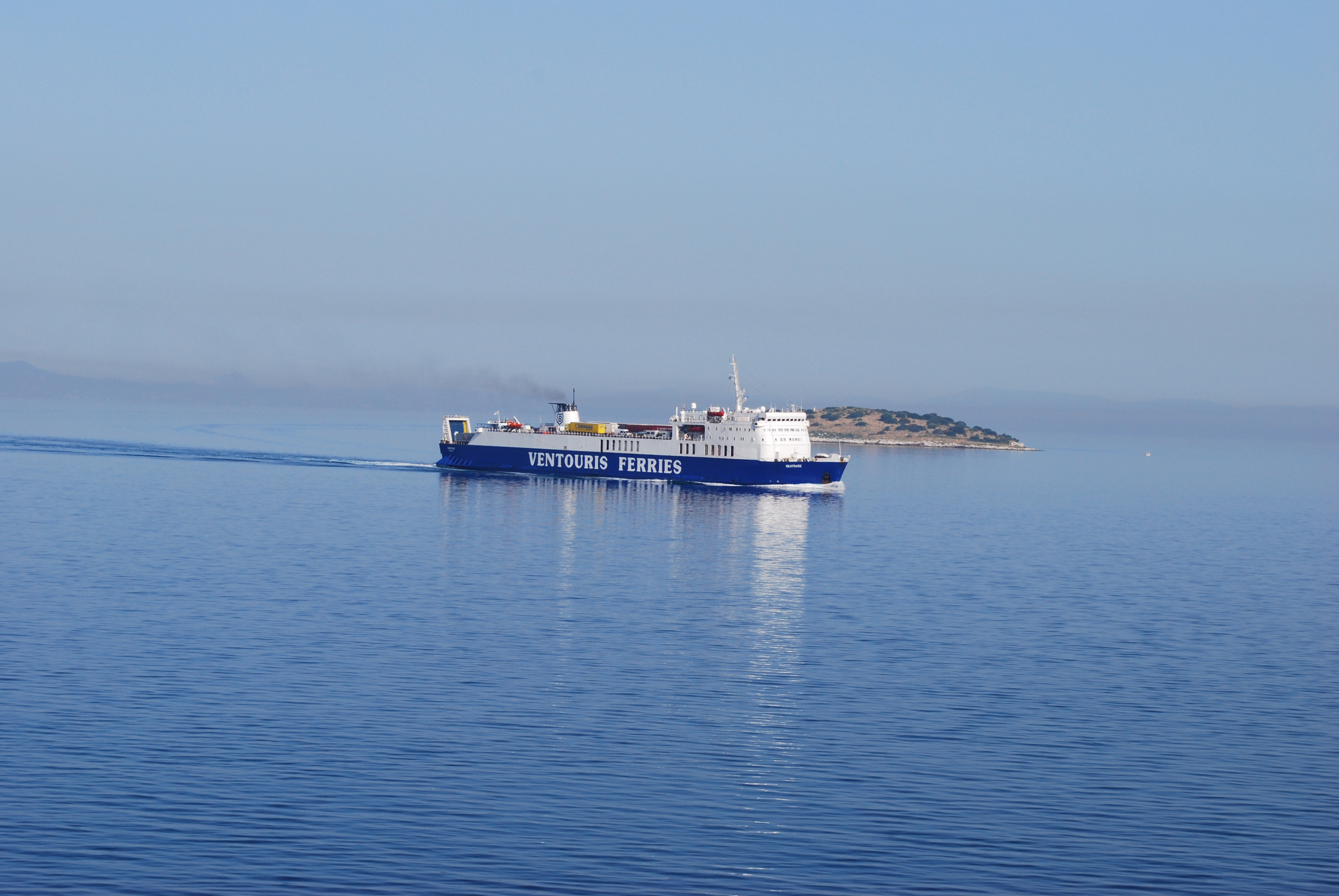 Le "Seatrade" de Ventouris Ferries, depuis le car-ferry "Olympic Champion" de Anek Lines, en mer Ionienne, au large de l'Epire.